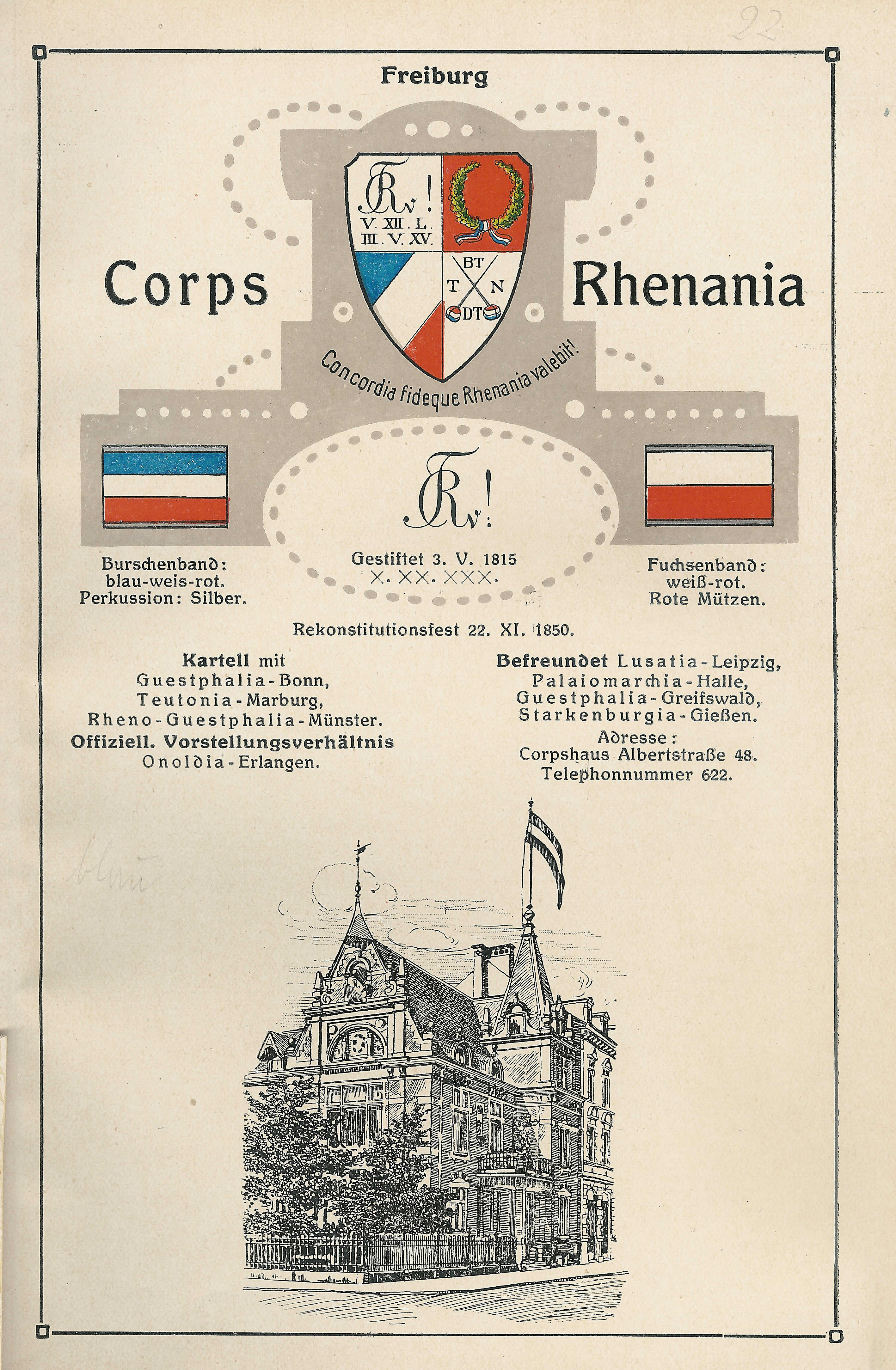 Wappen, Zirkel, Couleur und Corpshaus des Corps Rhenania Freiburg